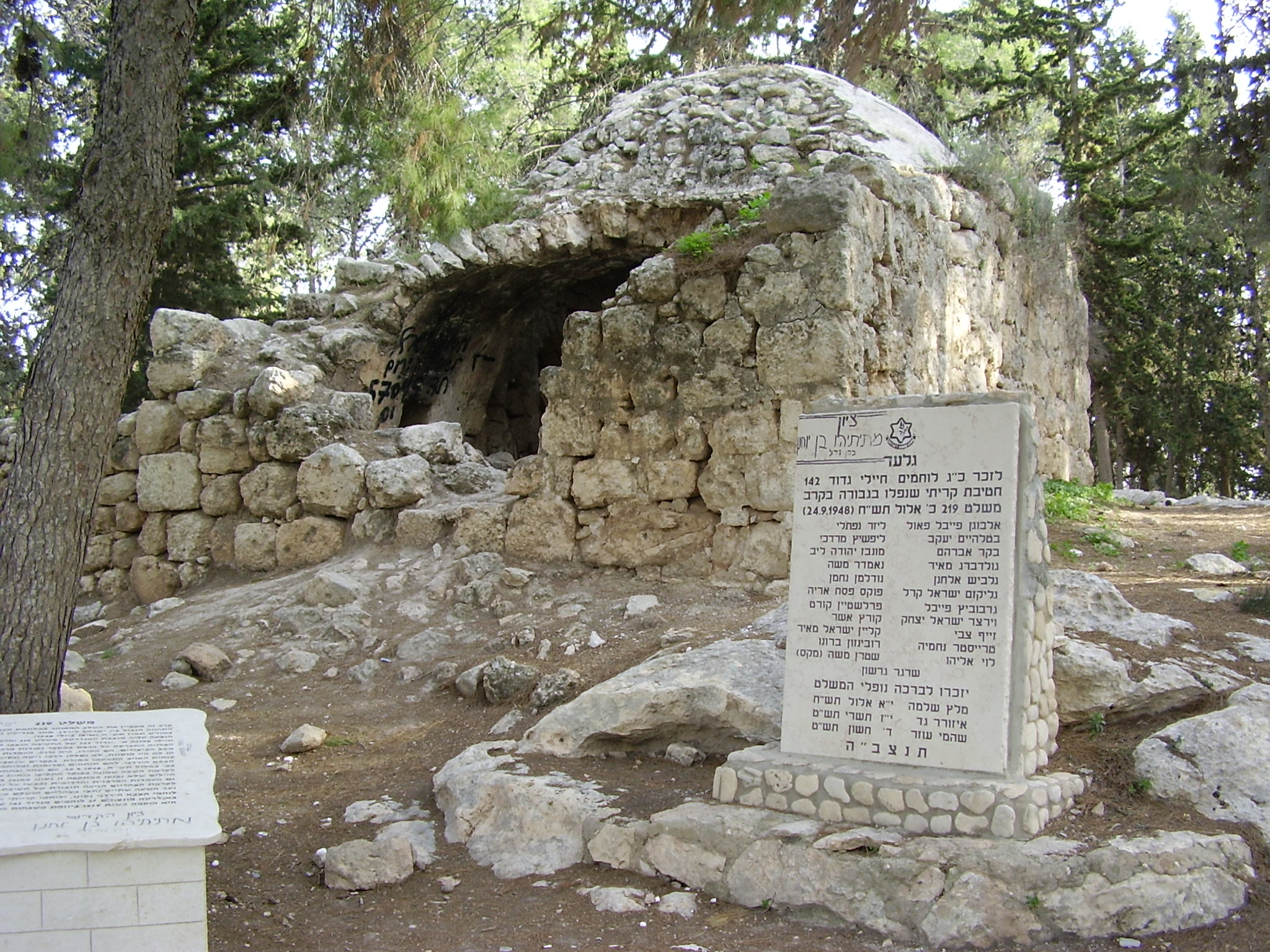 אנדרטה לחללי קרב משלט 219 במלחמת העצמאות